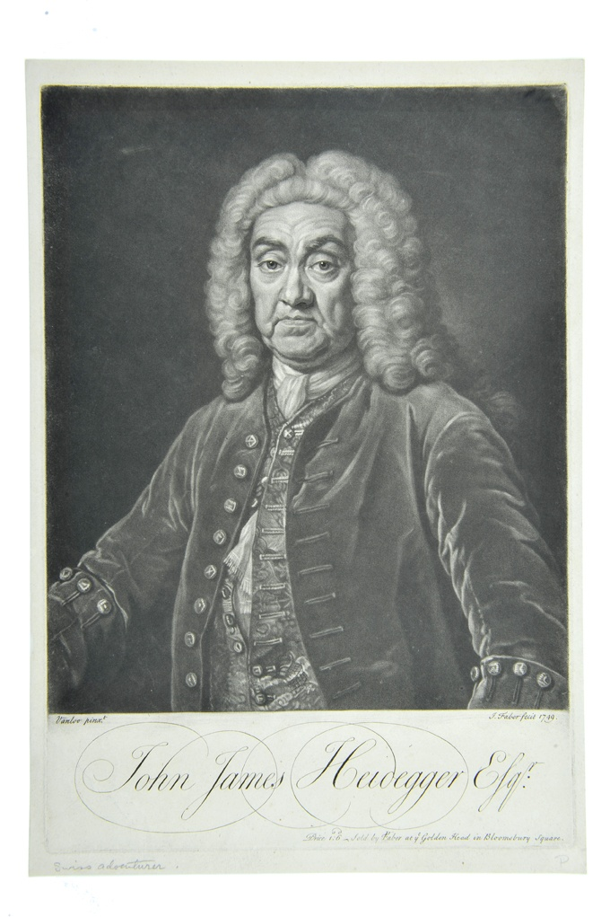 Das Porträt stellt den gebürtigen Schweizer John James Heidegger (auch: Johann Jacob Heidegger) dar. Um 1708 kam er nach London und wurde zwei Jahre später assistierender Direktor des"Queen’s Theatres"am Haymarket. Zwischen 1719 und 1728übernahm er das Direktorenamt der"Royal Academy of Music". Für dieses Opernunternehmen komponierten neben Georg Friedrich Händel auch Giovanni Battista Bononcini und Attilio Ariosti. Das vorliegenden Porträt wurde 1749 von dem englischen Schabkunststecher John Faber angefertigt ("J. Faber fecit 1749"). Die Vorlage stammt von dem flämischen Maler Jean Baptiste van Loo ("Vanloo pinx.t").Der Theaterdirektor Heidegger ist in der Kleidung seiner Zeit und gemäß seines Standes abgebildet. Sein Gewand ist schlicht und er trägt keinen Schmuck. Der Gesichtsausdruck Heideggers ist sehr streng. Die große, kunstvoll gestaltete Bildunterschrift gibt den vollständigen Namen des Theaterdirektors in der englischen Fassung wieder:"John James Heidegger Esqr.".Zudem ist ein kleiner Hinweis auf den Preis und die Herkunft des Porträts am rechten unteren Bildrand zu finden:"Price 1:6 Sold by Faber at ye Golden Head in Bloomsbury Square.".